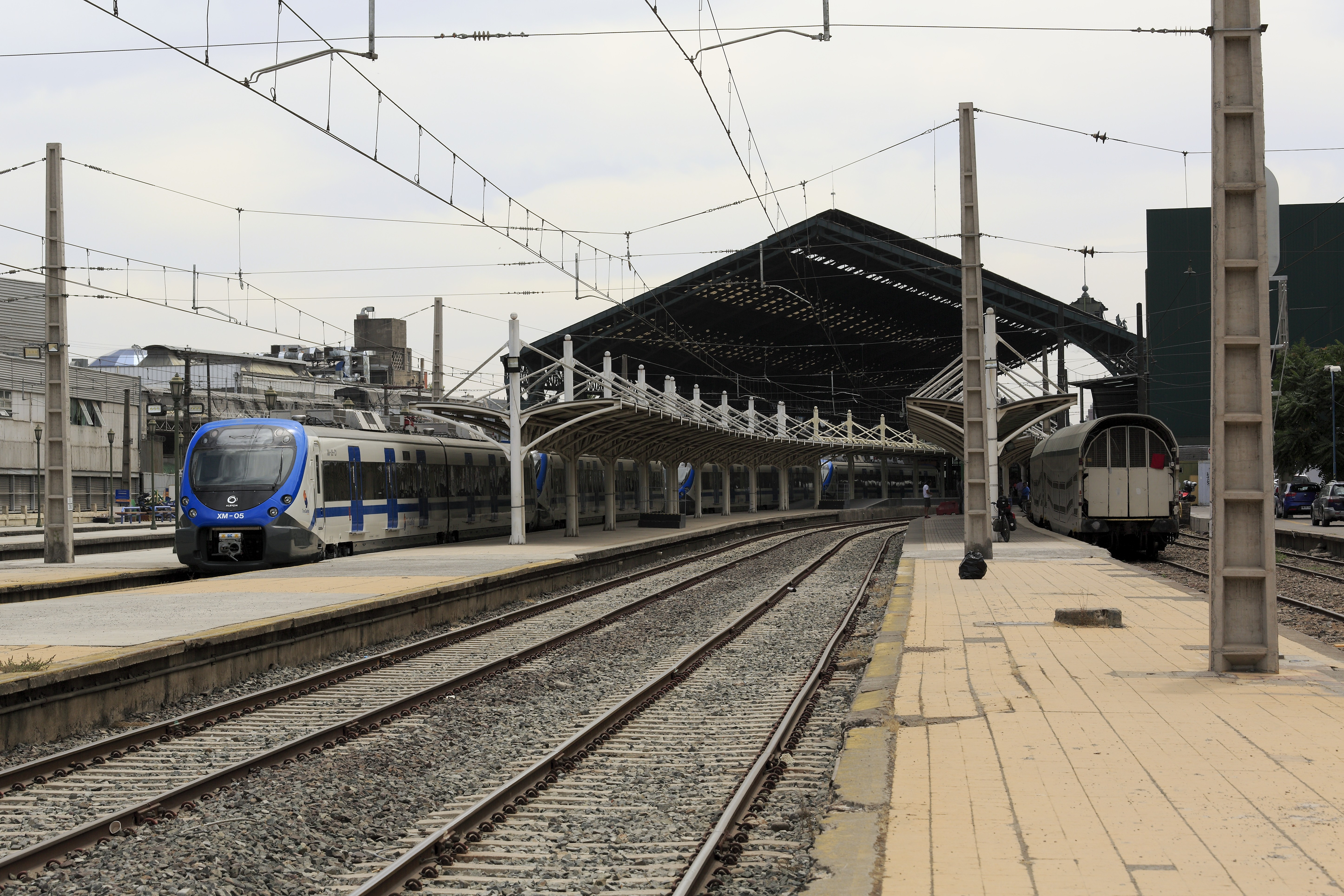 Die Bahnsteighalle von Süden, die beiden Autotransportwagen rechts stehen an der Kopframpe und werden beladen. Auf dem Gleis 4 stehen vier Triebwagen der neuen Bauart X’Trapolis Modular. Sie sind für die S-Bahn-Verbindung nach Nos vorgesehen, die Strecke ist noch in Arbeit. Zum Aufnahmezeitpunkt gibt es nur Probefahrten.